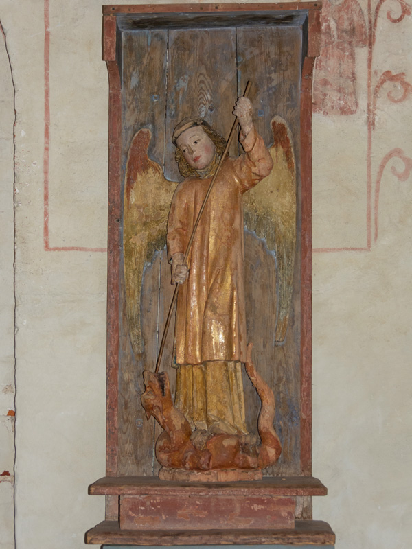 Finströms kyrka Sankt Mikael